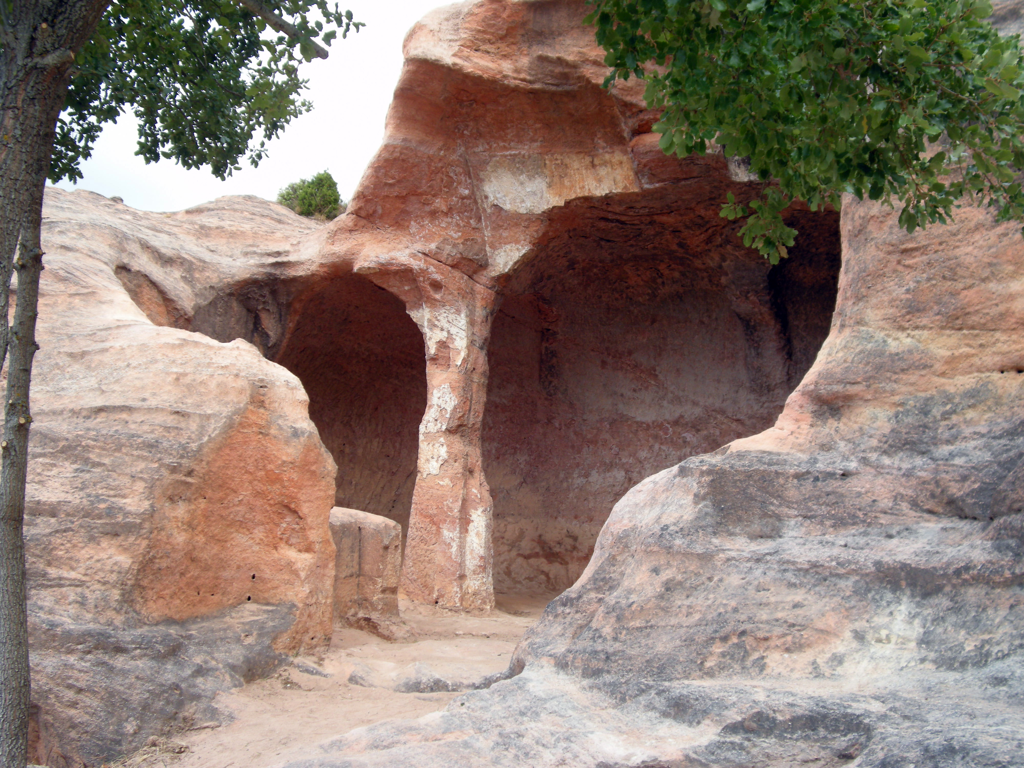 Entrada al Eremitorio de Argés, Valle de Manzanedo, Burgos